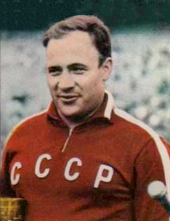 FIGURINA PANINI-CAMPIONI DELLO SPORT 1968-LANCIO DEL PESO-N° 56-KLIM